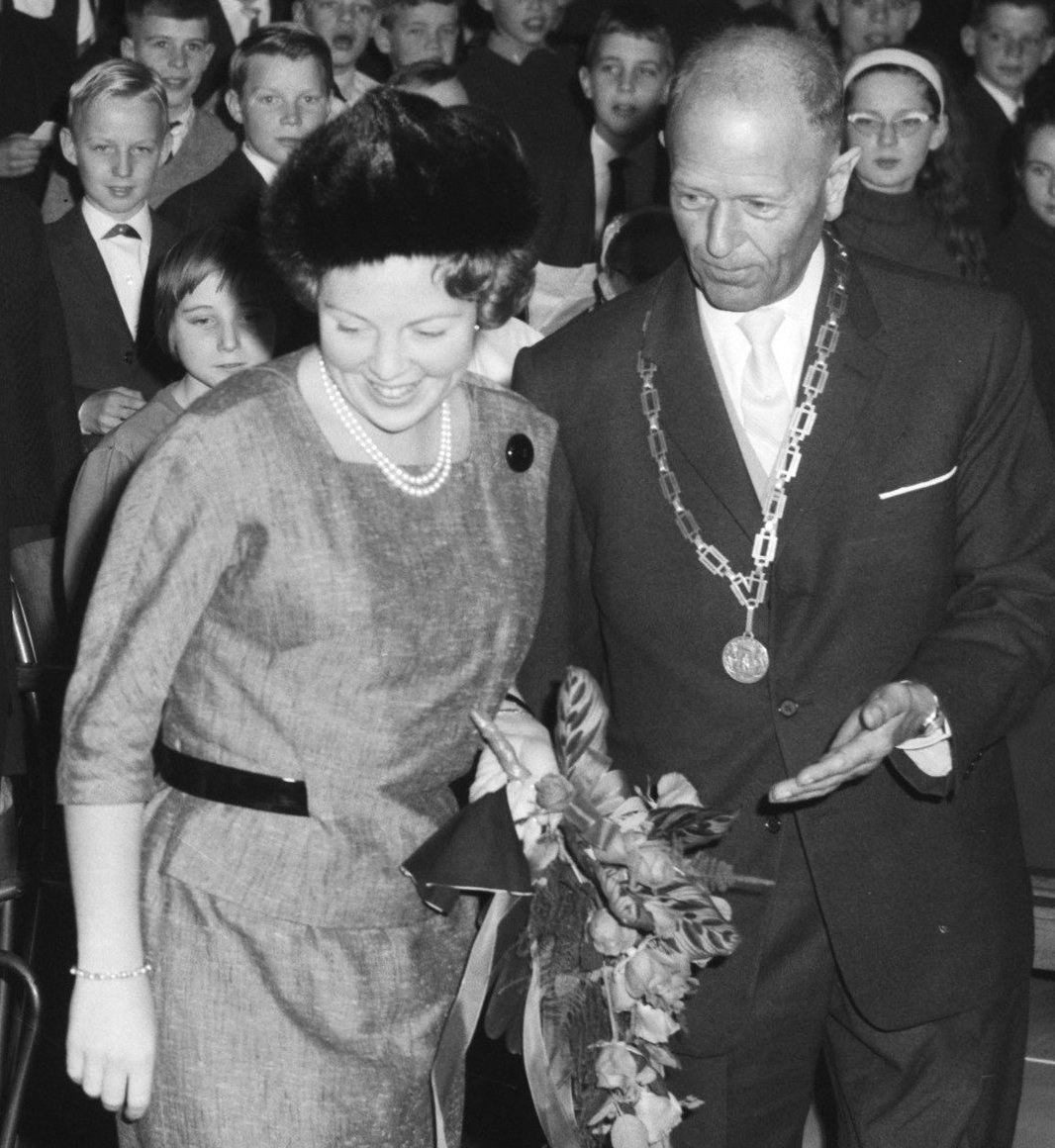 Collectie / Archief : Fotocollectie Anefo Reportage / Serie : [ onbekend ] Beschrijving : Prinses Beatrix in Concerthuis te Assen. Middagprogramma voor de Drentse jeugd bijgewoond. Hier tijdens de zanguitvoering rechts burgemeester mr. P. P. Agter Datum : 16 november 1963 Locatie : Assen Trefwoorden : Jeugd Persoonsnaam : Beatrix, prinses Fotograaf : Bilsen, Joop van / Anefo Auteursrechthebbende : Nationaal Archief Materiaalsoort : Negatief (zwart/wit) Nummer archiefinventaris : bekijk toegang 2.24.01.04 Bestanddeelnummer : 915-7454